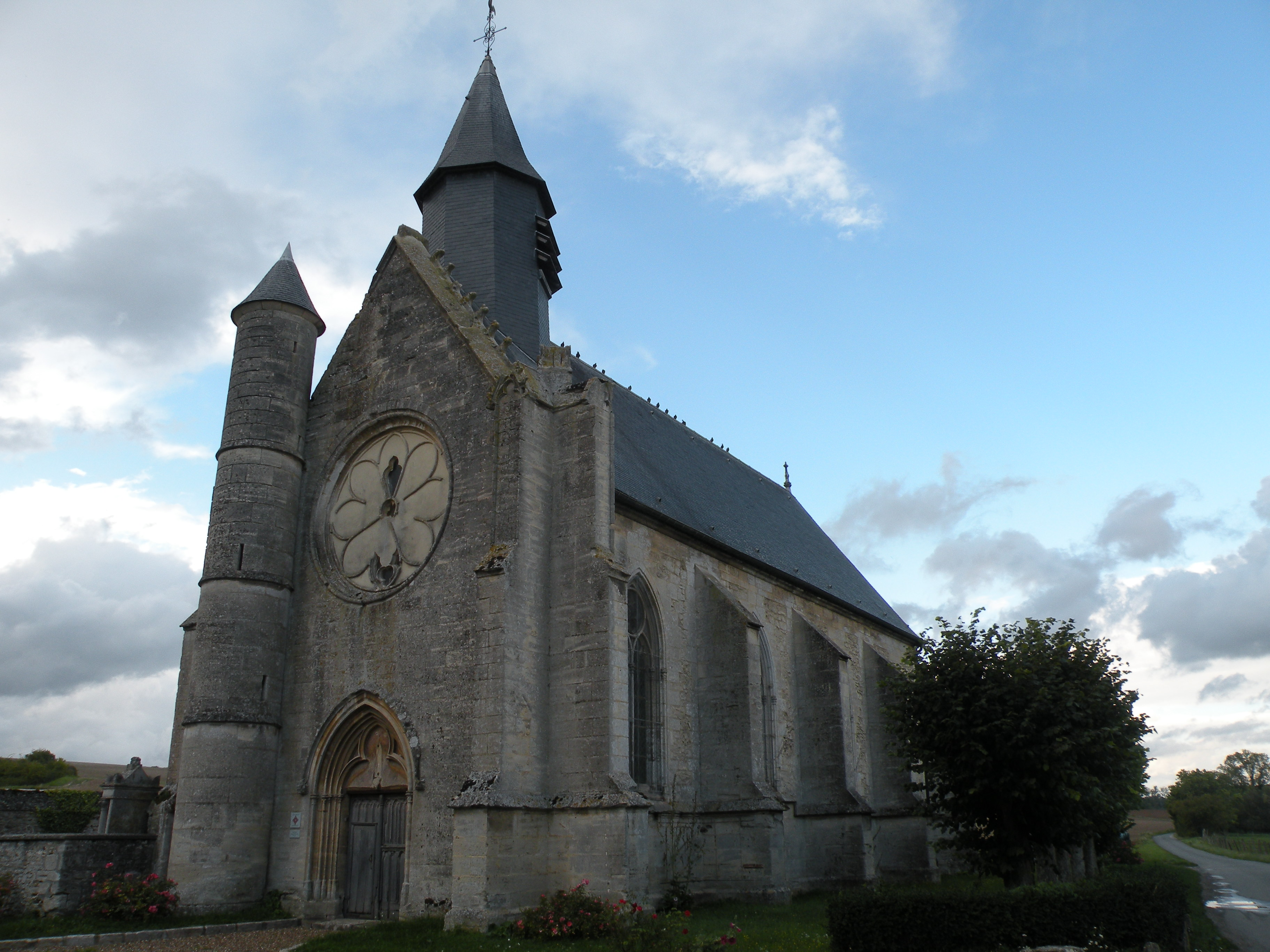 chantrerie de Silly-Tillard